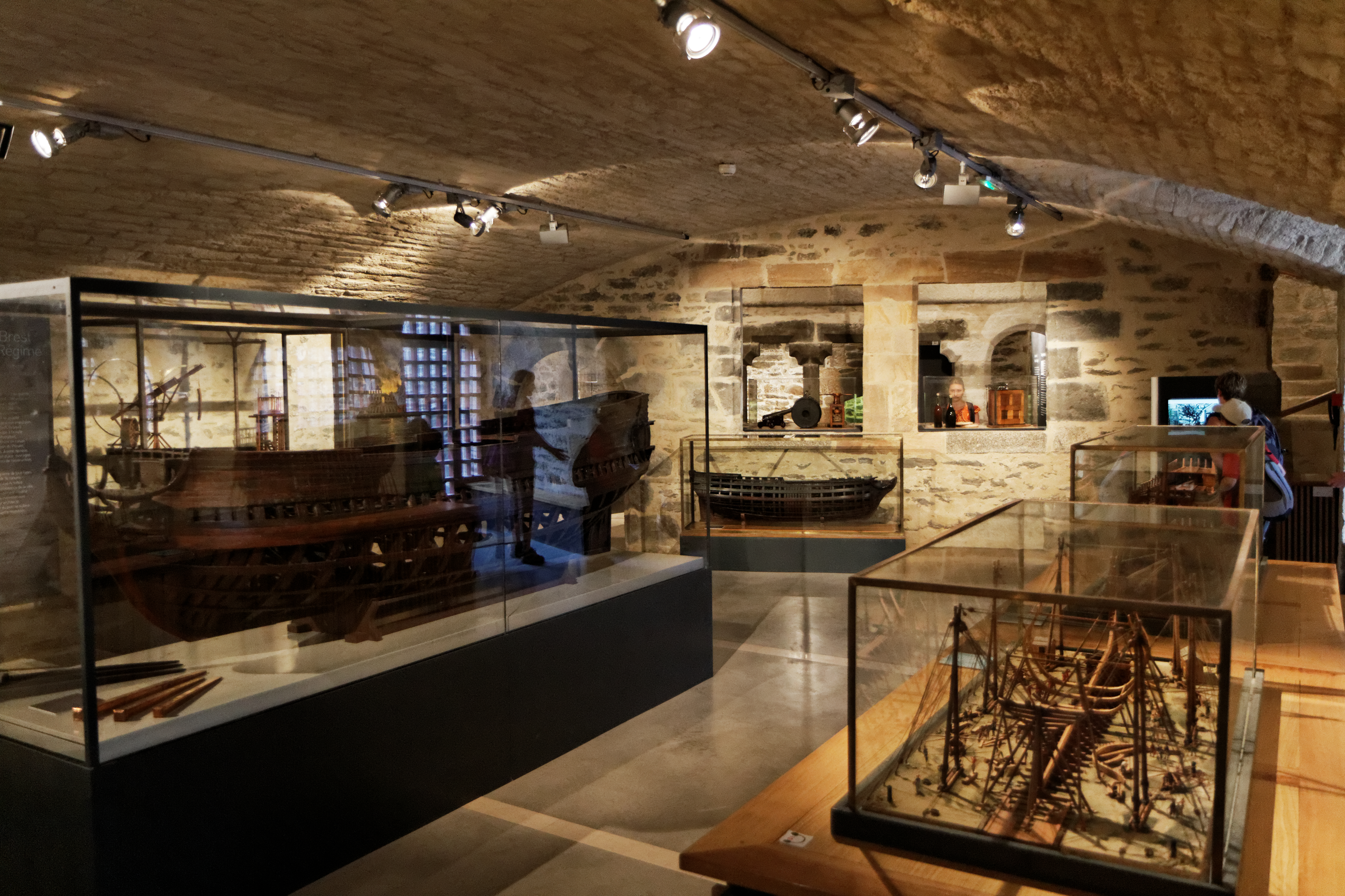 Une salle d'exposition du château de Brest.